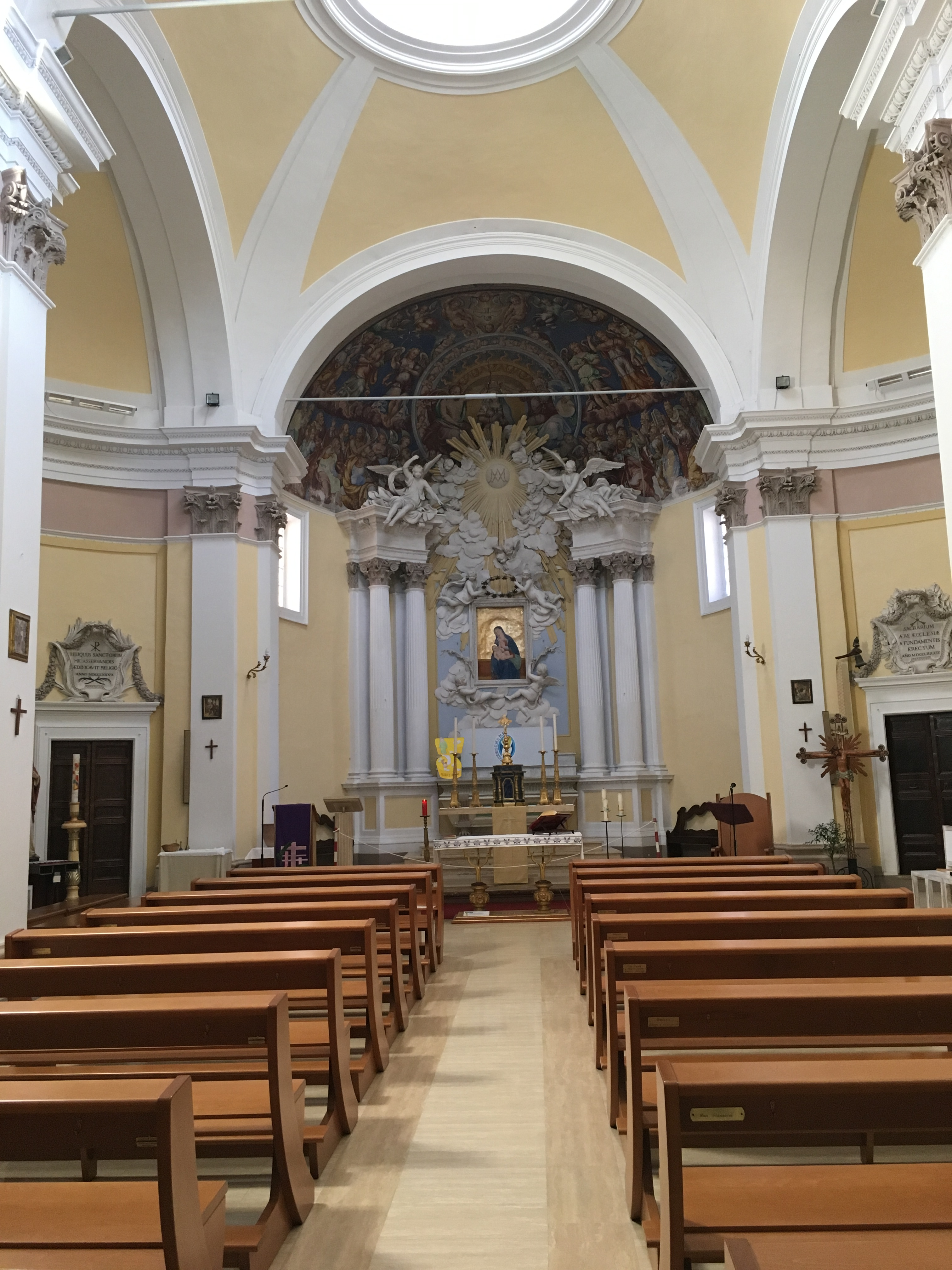 Santuario Madonna della Bianca